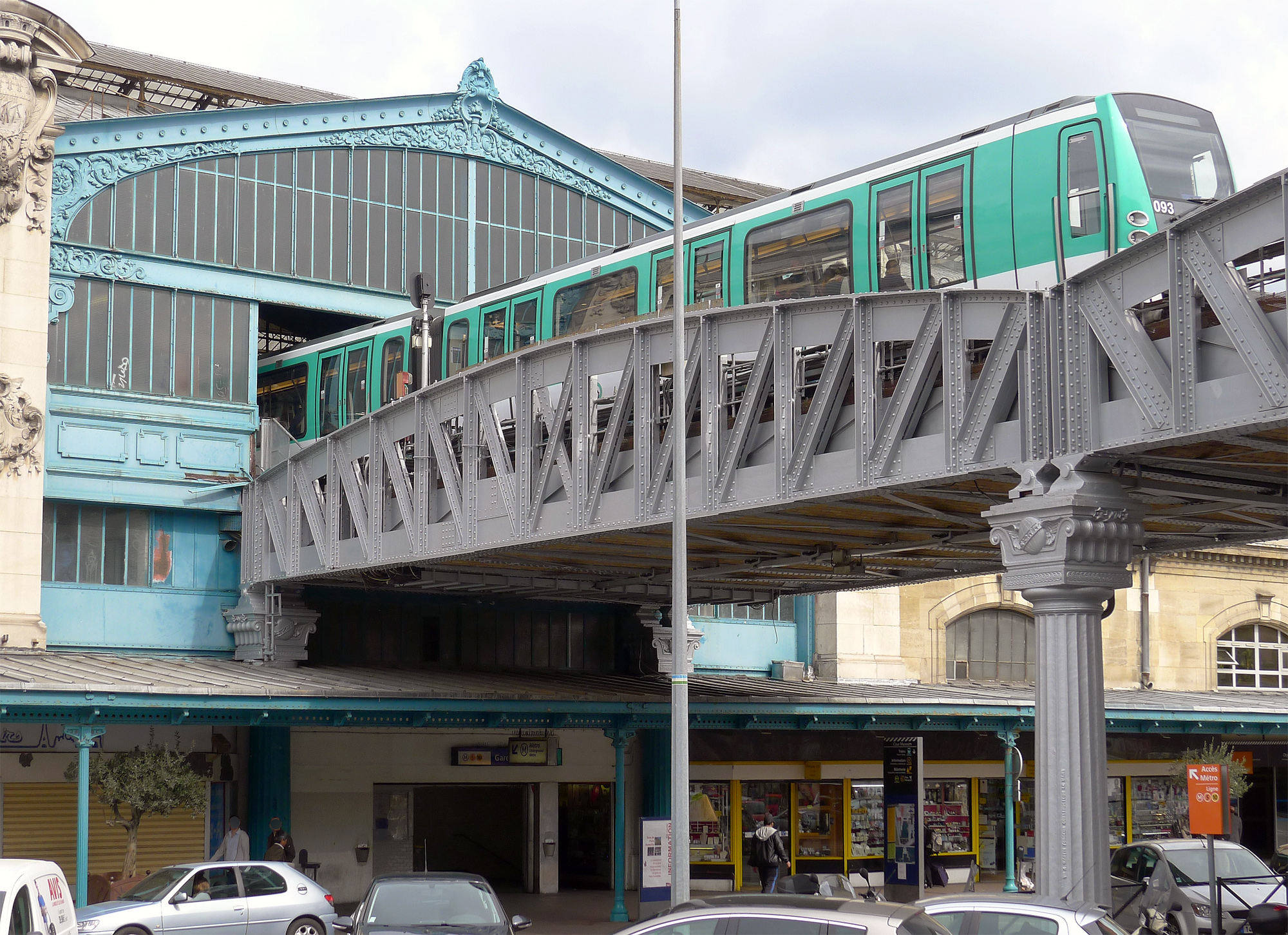 Ligne de métro n°5 à la station gare d'Austerlitz - Paris XIII